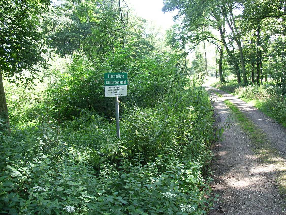 Hinweis auf Flachsrösten im Erkelenzer Wahnenbusch